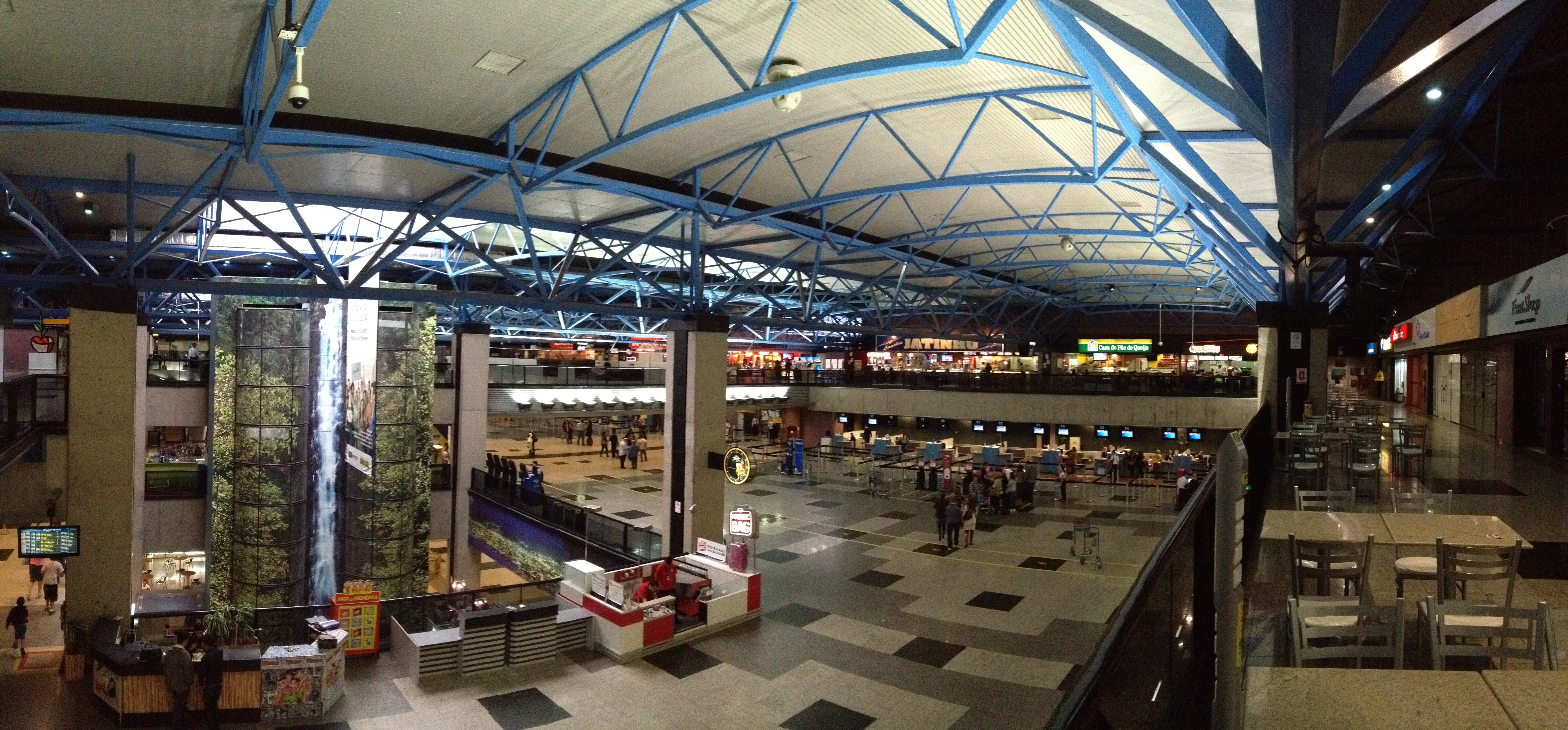 Aeroporto Internacional de Curitiba PR